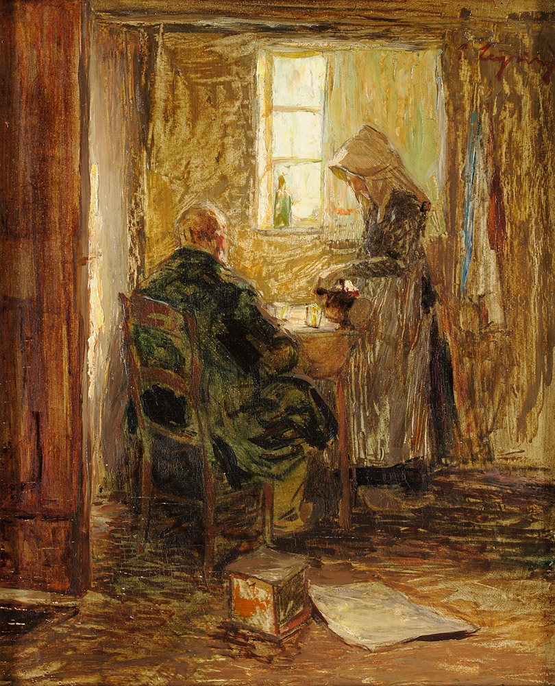 Der Nachmittagstee. Signiert. Öl auf Holz, 48 x 38 cm